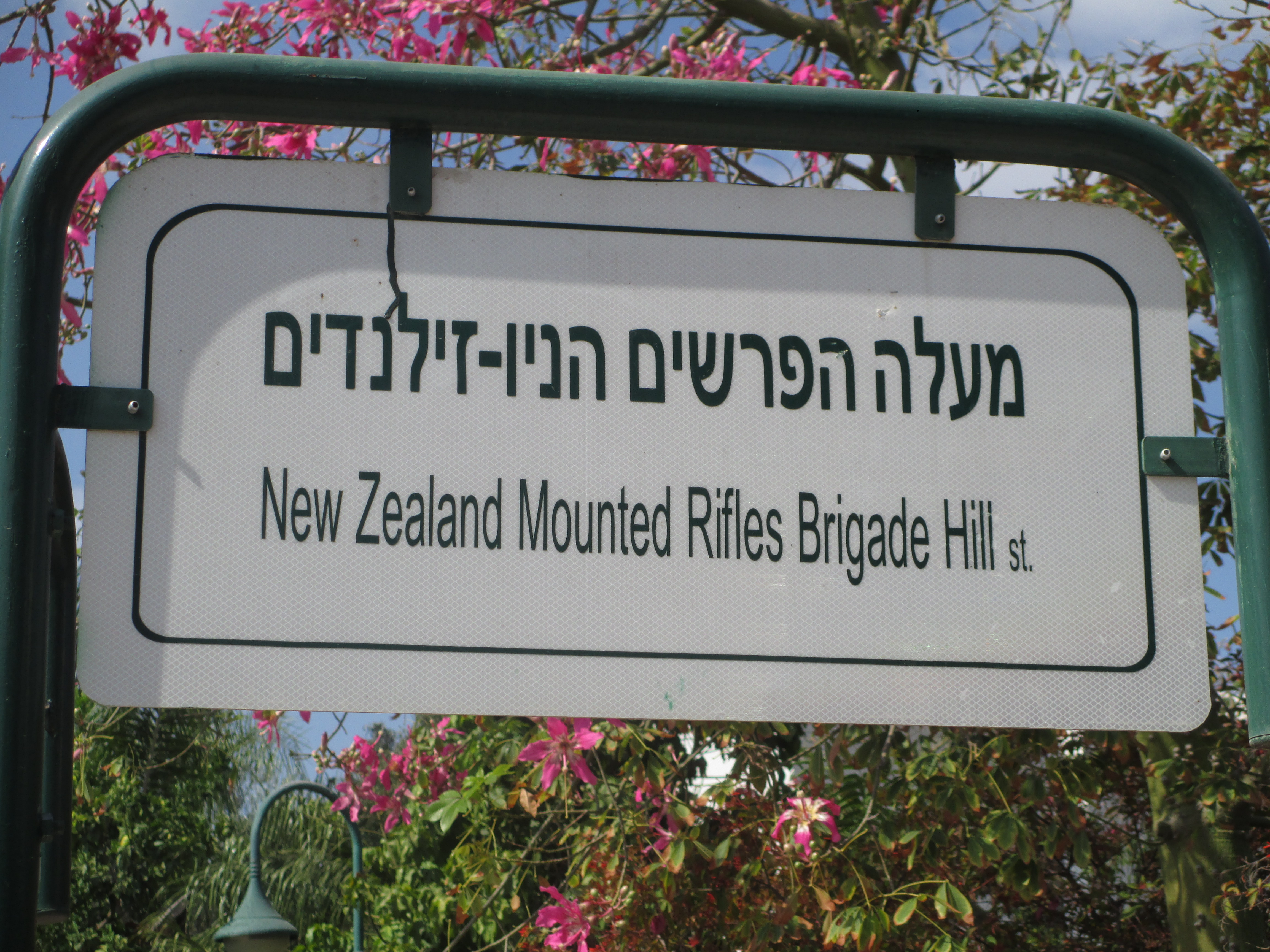 רחוב מעלה הפרשים הניו זילנדים בנס ציונה